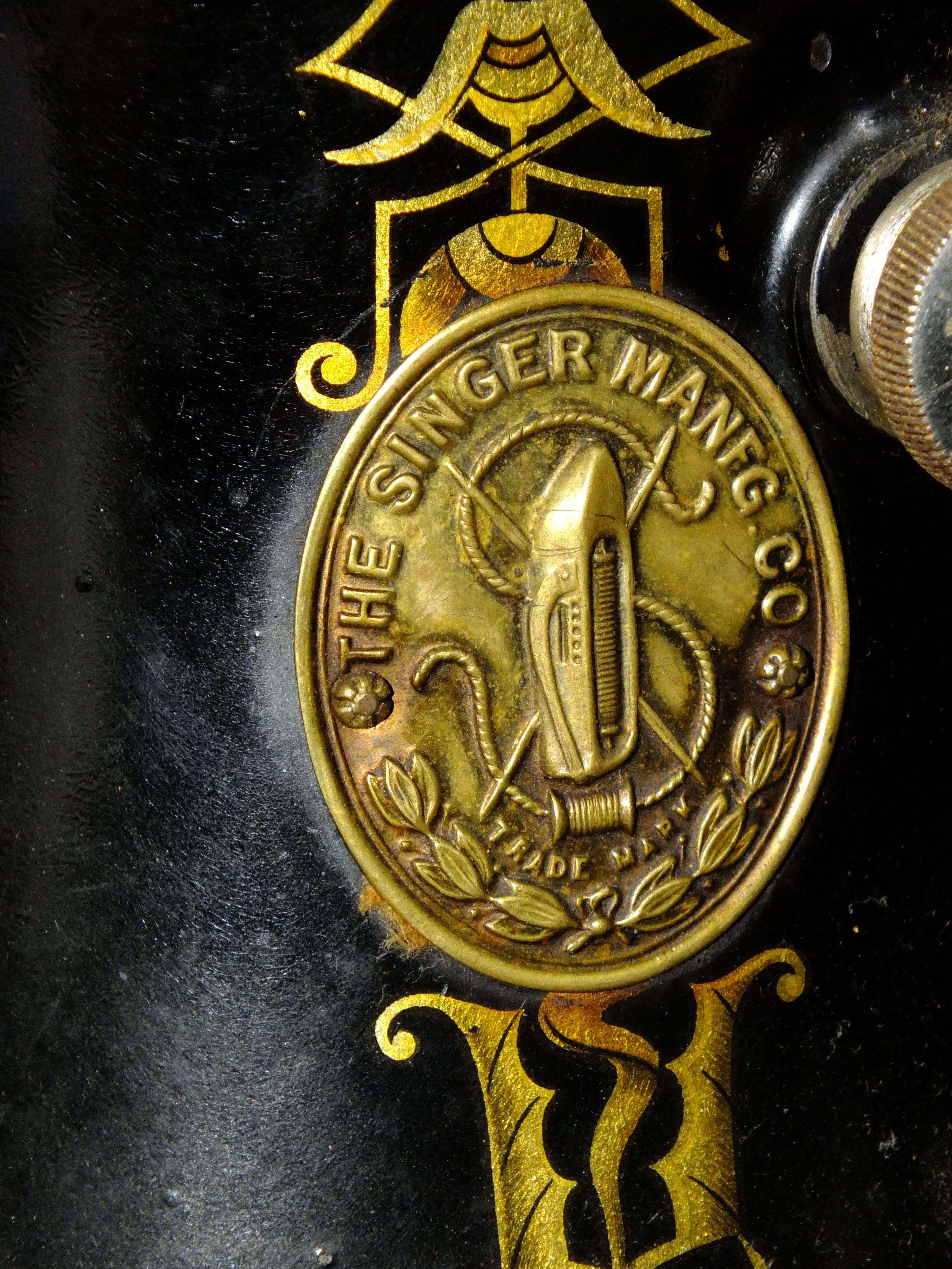 Деталь швейной машины Зингер